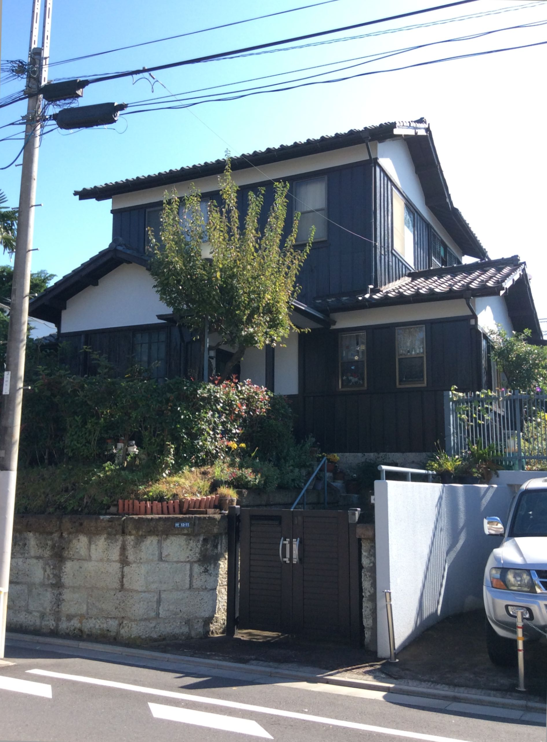 田園調布 位田家住宅